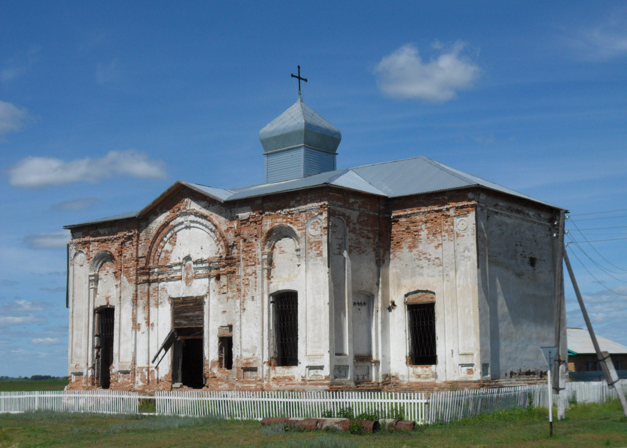 Церковь Рождества Христова в селе Афонькино Казанского района. Построен и освящён в 1880 году